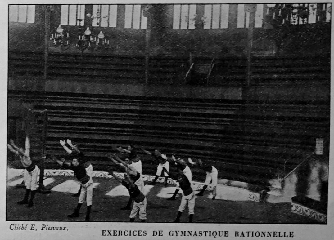 publié dans le "Bulletin de l'œuvre des voyages scolaires".